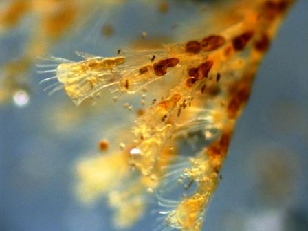 Bryozoa